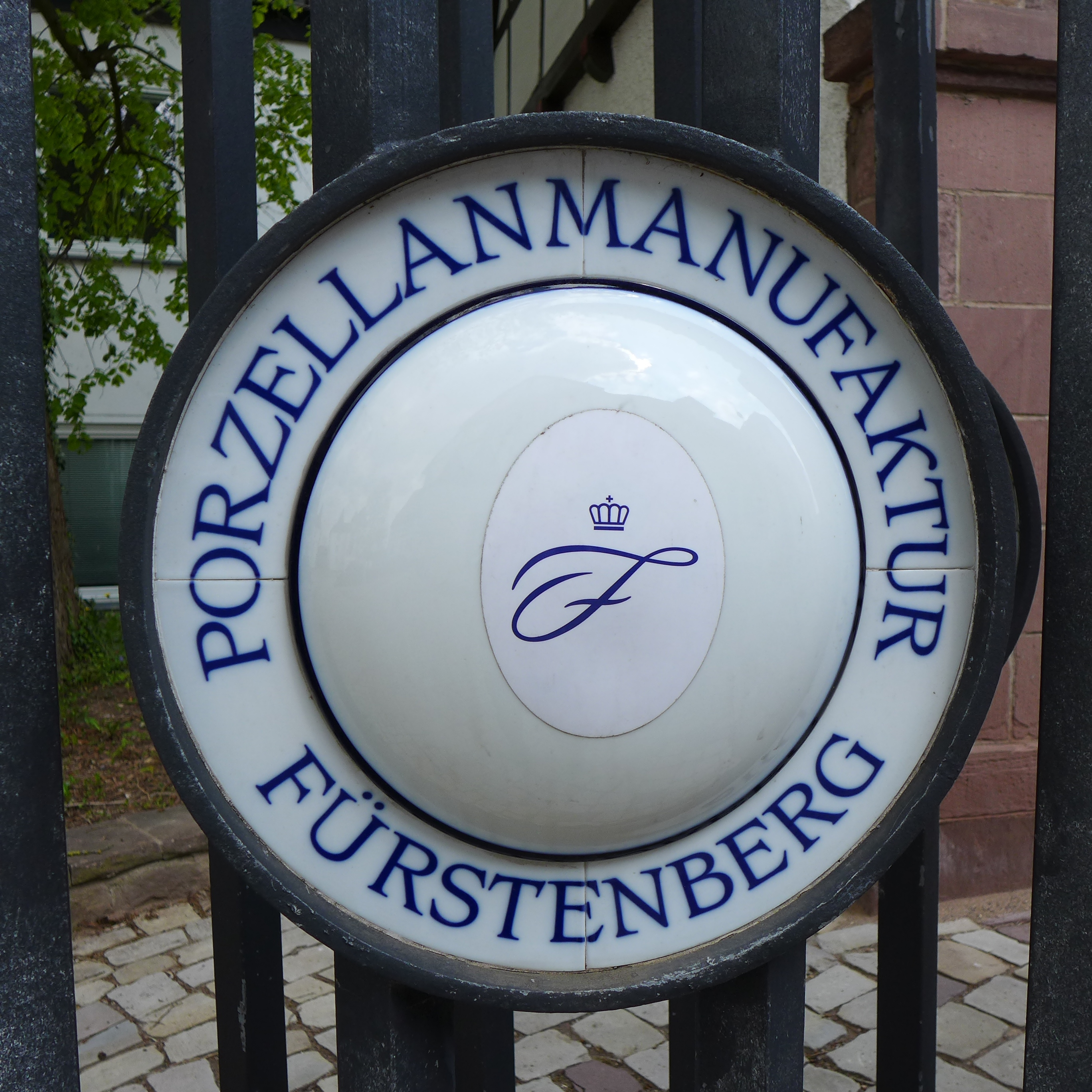 Porzellan Logo am Tor in Fürstenberg